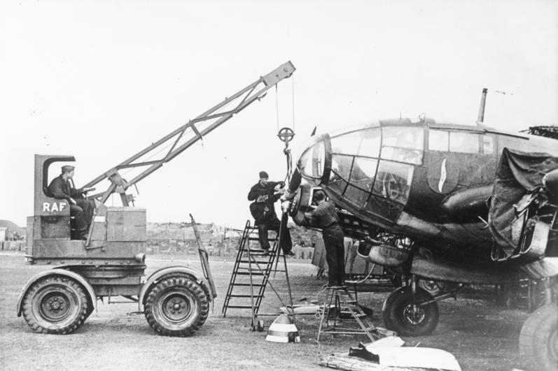 Stets einsatzbereit müssen unsere Flugzeuge für die ununterbrochenen Vergeltungsschläge unserer Luftwaffe gegen England sein. Der Motor eines Heinkel - Kampffluzeuges He 111 wird überholt. Ein englischer Beutekran der R.A,F. leistet hierfür gute Dienste.